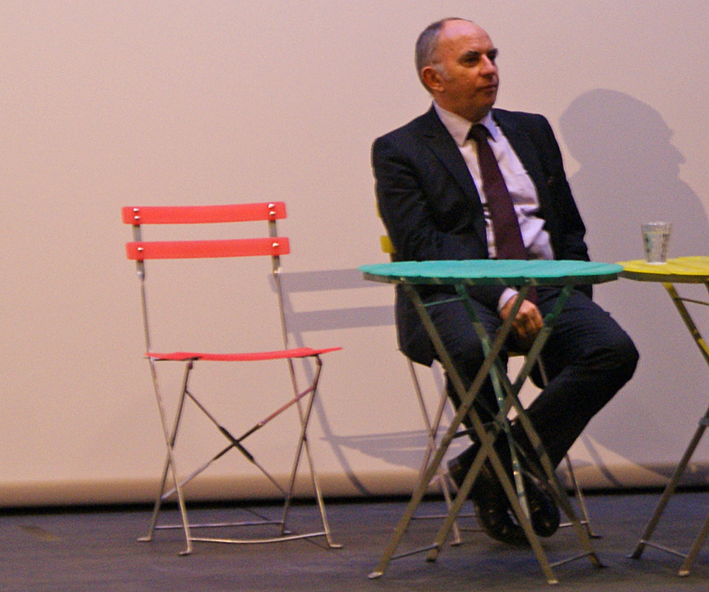 Ylljet Aliçka, écrivain et ambassadeur albanais, à une présentation du film »Slogan« à Genève